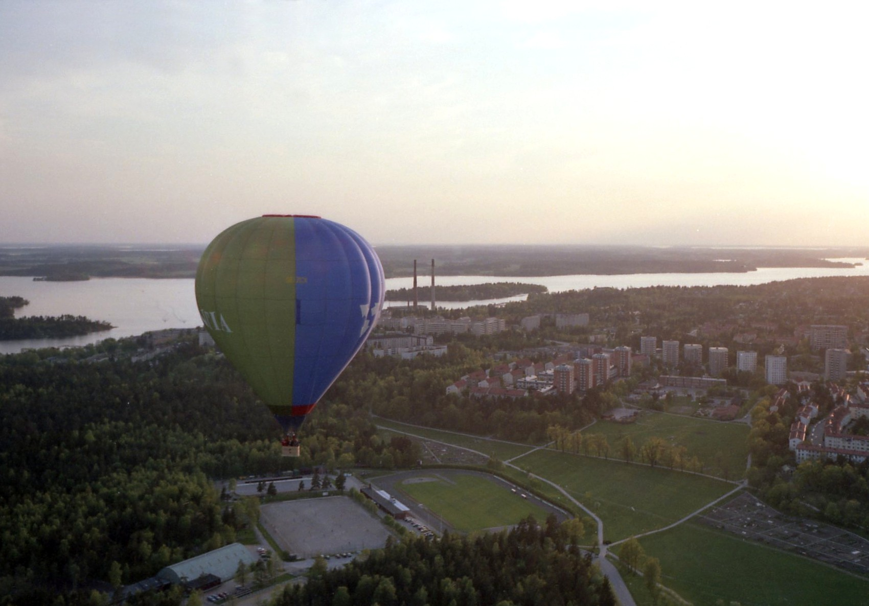 Grimsta IP, Hässelby strand, Hässelby värmeverk och Mälaren från ballong 1988, vy mot väst